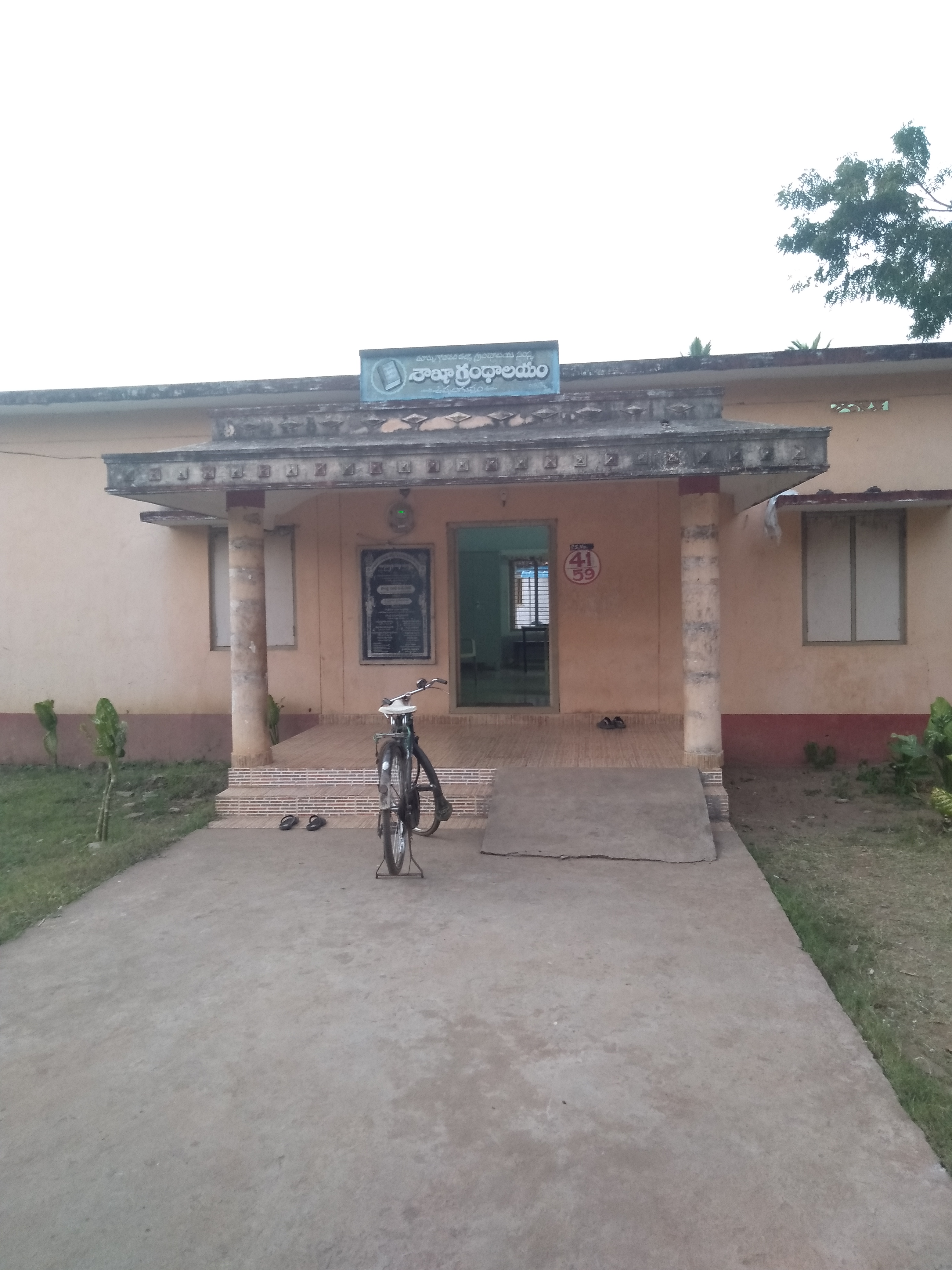 ఉప్పలగుప్తం మండలం లో గ్రంధాలయం